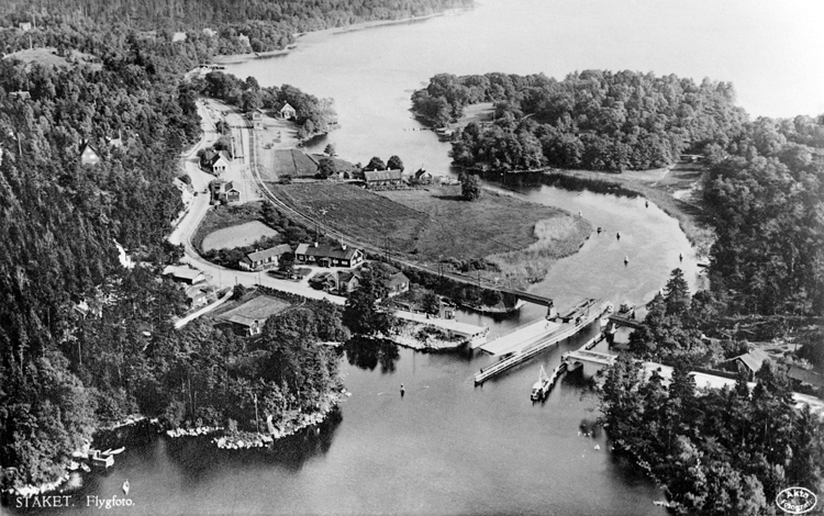 Flygbild över Stäketsundet med Stäksön och Stäketsholmen till höger. Enköpingsvägen och järnvägen går snett genom bilden. Broöppning är på gång. Till höger om landsvägsbron ligger en av SJ:s tjänstebostäder och till vänster om bron direkt till vänster om granen ligger brovaktarstugan, Stäketsborg med flygeln där gamla lanthandeln och posten en gång inrymdes, godsmagasinet, järnvägsstation och pumphuset vid järnvägen. Mitt emot godsmagasinet ligger Stäkets Lanthandel (Byxan) där också posten en period inrymdes. Stäkets värdshus och krog ligger vid sundet i höjd med järnvägsstationen.